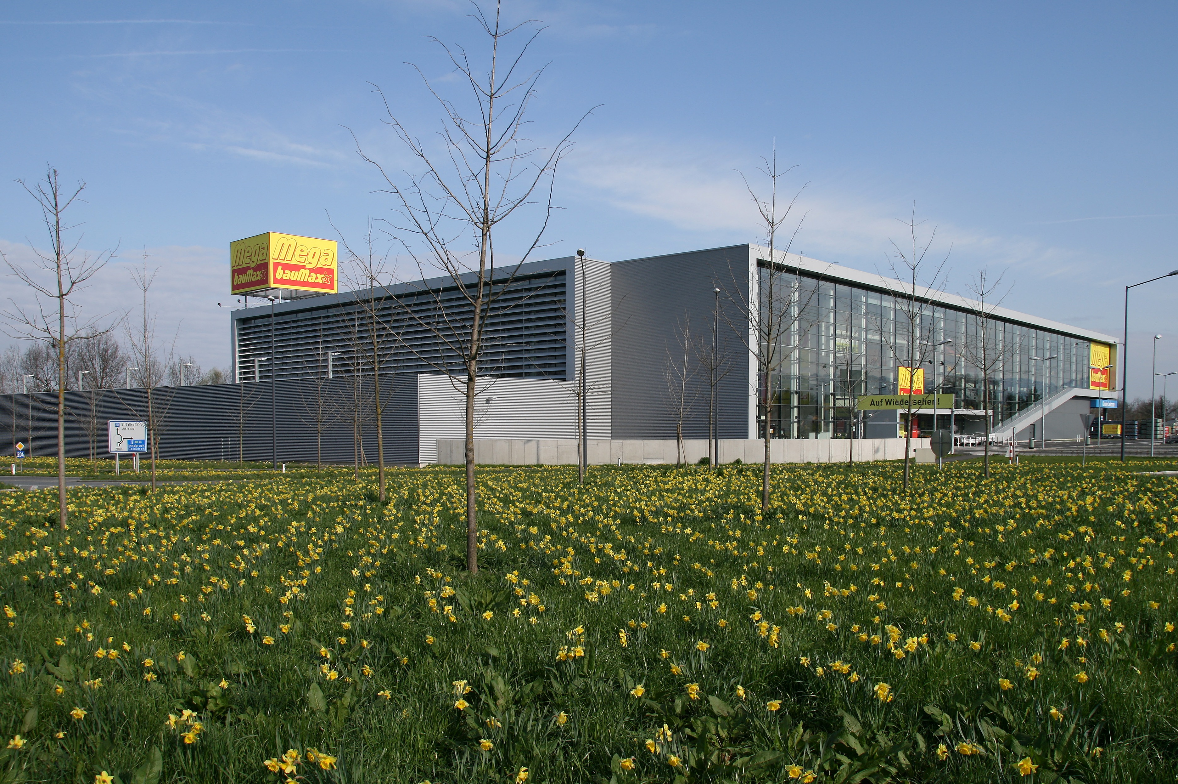 Narzissen (Narcissus) vor dem “Mega Baumax” in Schoren gebaut von der ARGE “Wilhelm+Mayer und Nägele-Bau” Dornbirn